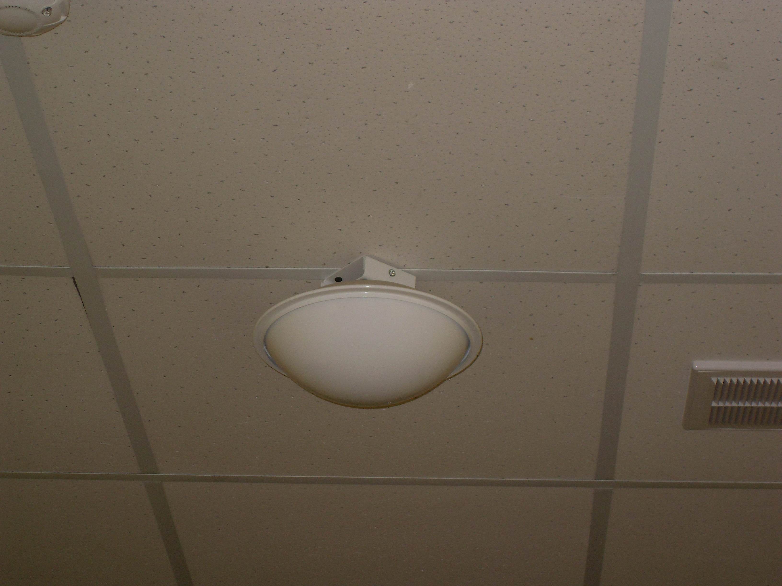 Модуль порошкового пожаротушения Буран-2.5, закрепленный на подвесном потолке